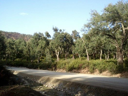 achjar lbalout